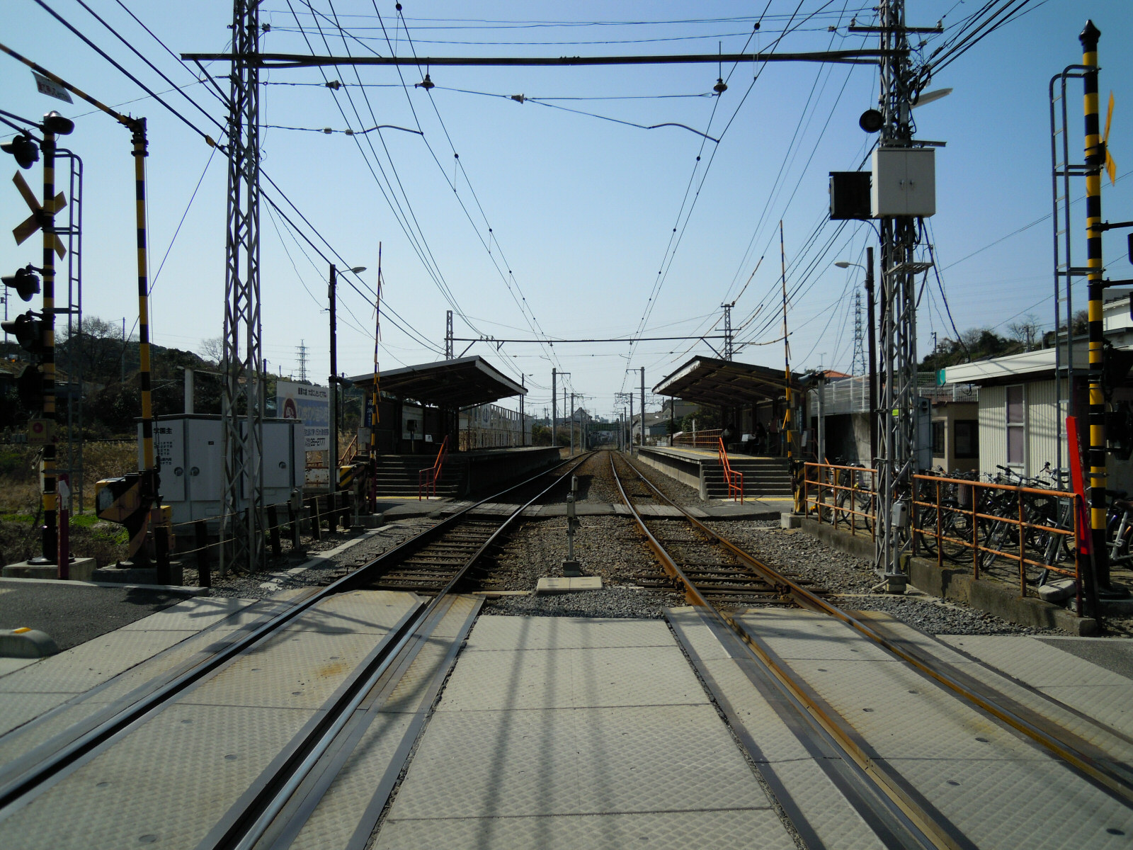 Iyo Railway Nishikinuyama Station